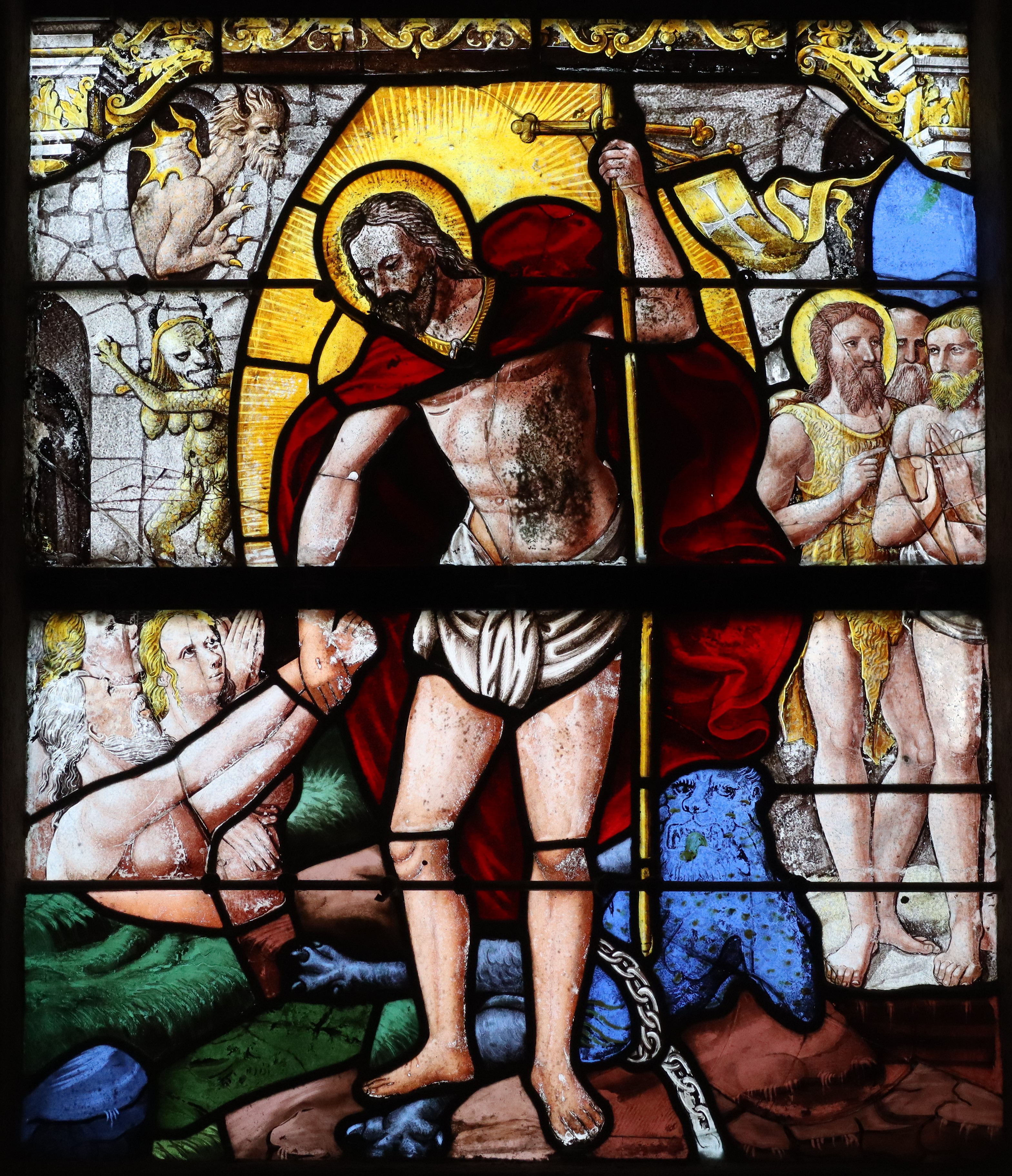 Descente aux enfers. Détail du vitrail classé de l'église de Bazouges-la-Pérouse (35).